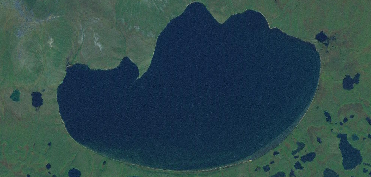 Image satellite du Lac Ozhogino.